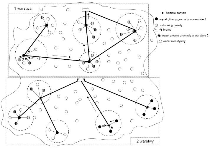 Ruting hierachiczny - topologie. Trasowanie hierarchiczny – topologie.